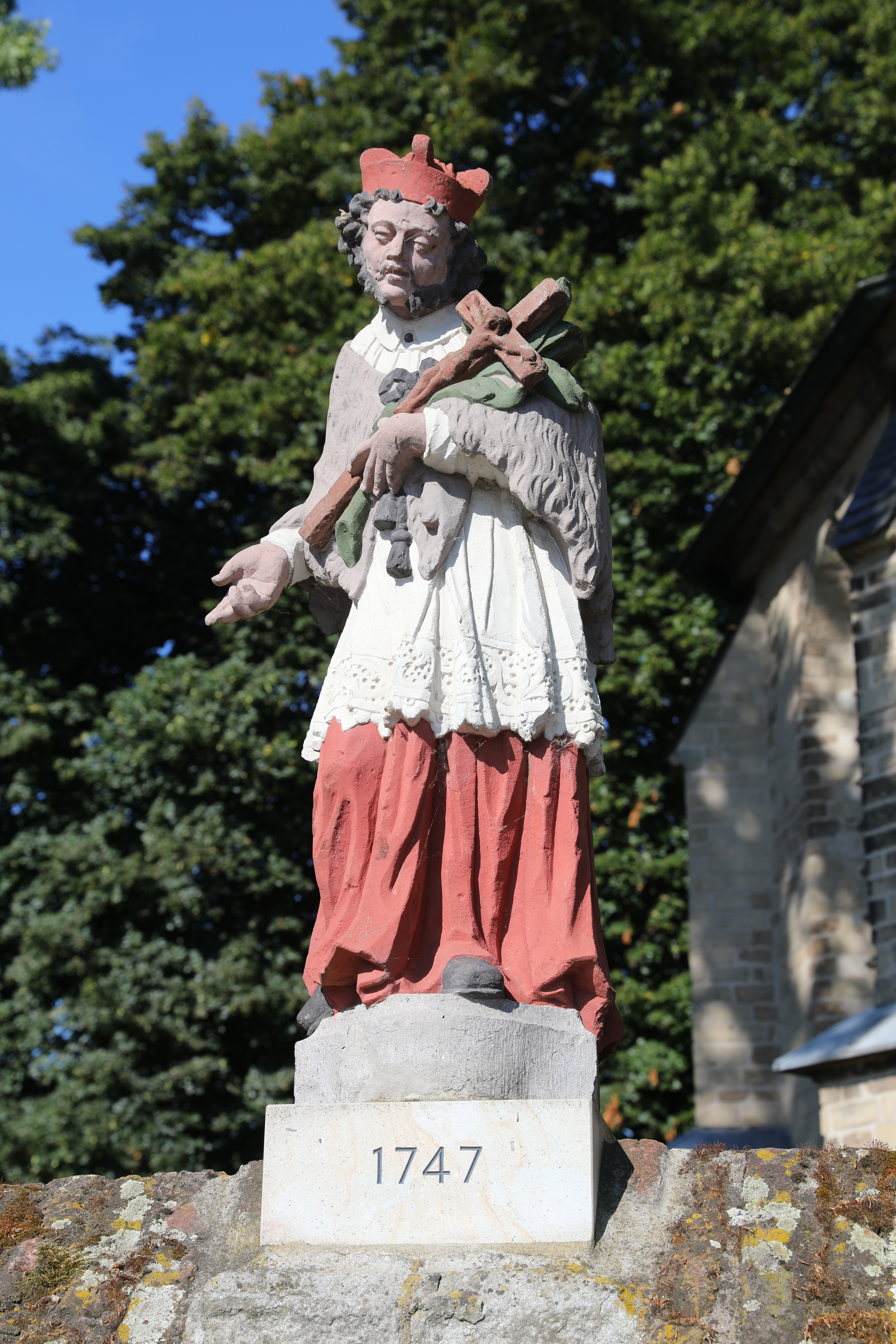 Nepomukstatue (restauriert), Köln-Niehl, Sebastianstr. 231This is a photograph of an architectural monument.